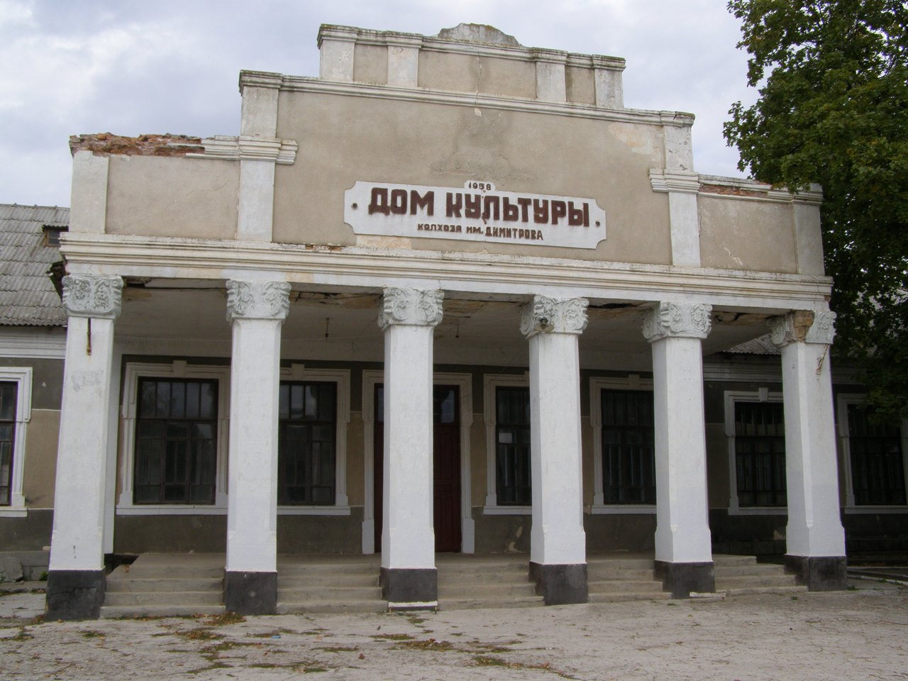 С. Дмитровка Татарбунарского района